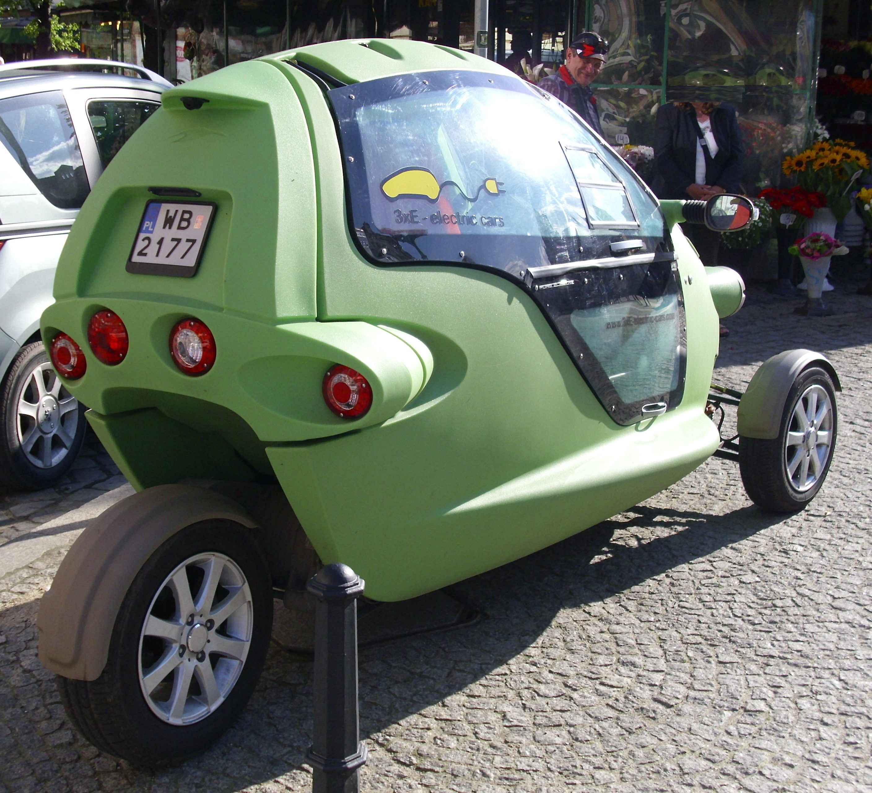 Sam Re-Volt